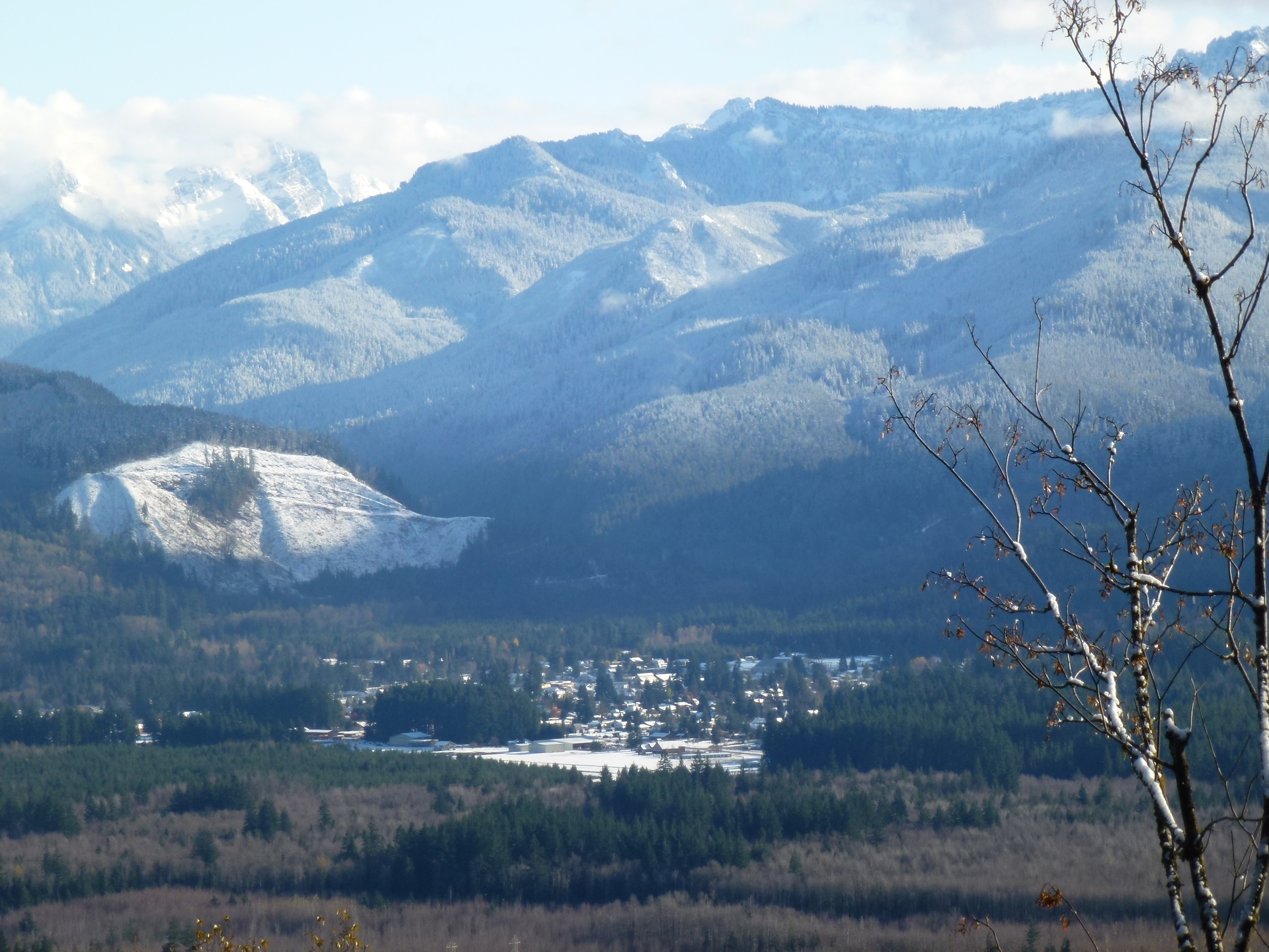 Darrington